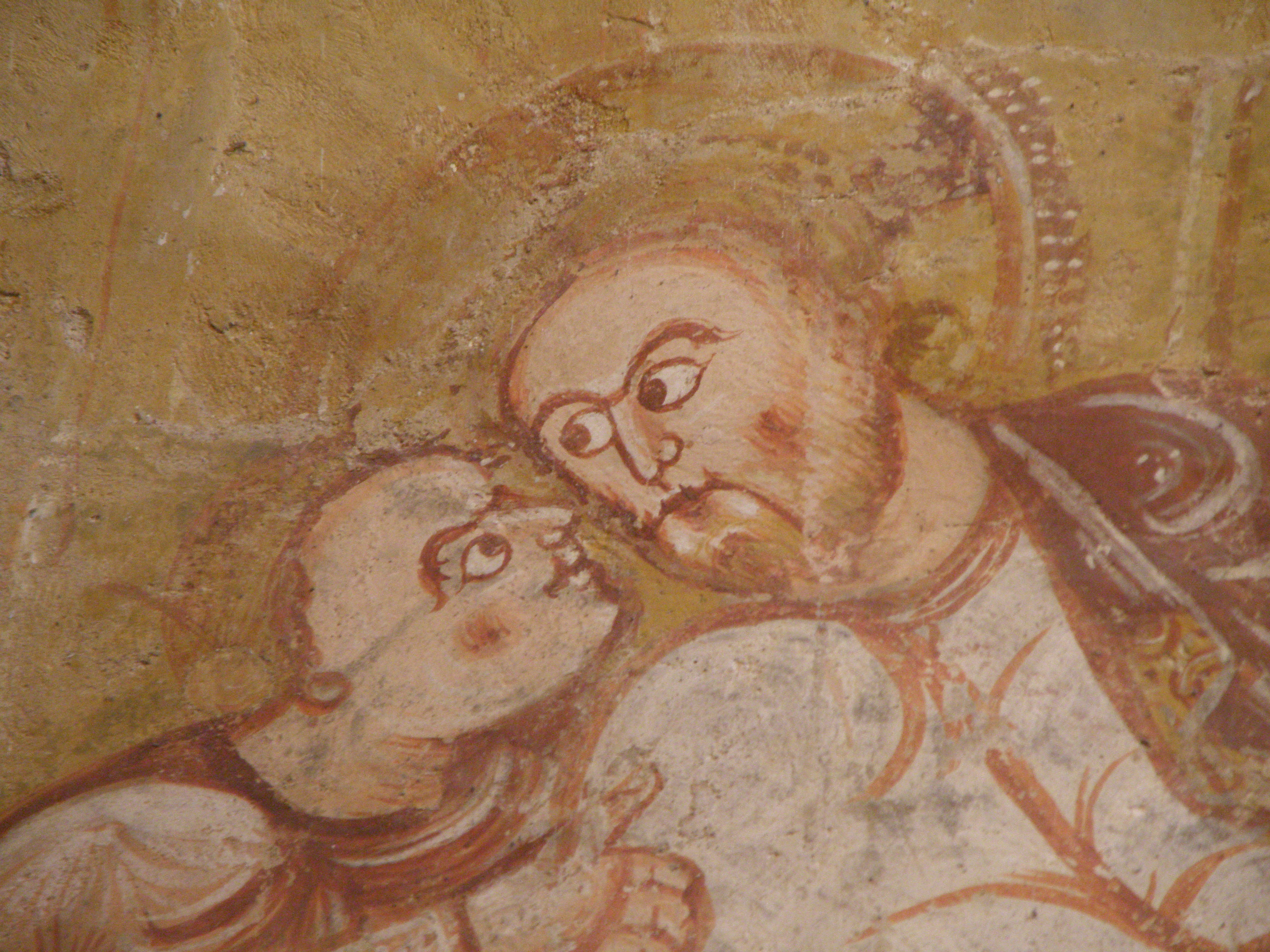 Église Saint-Martin de Vic. Baiser de Judas (extrait)